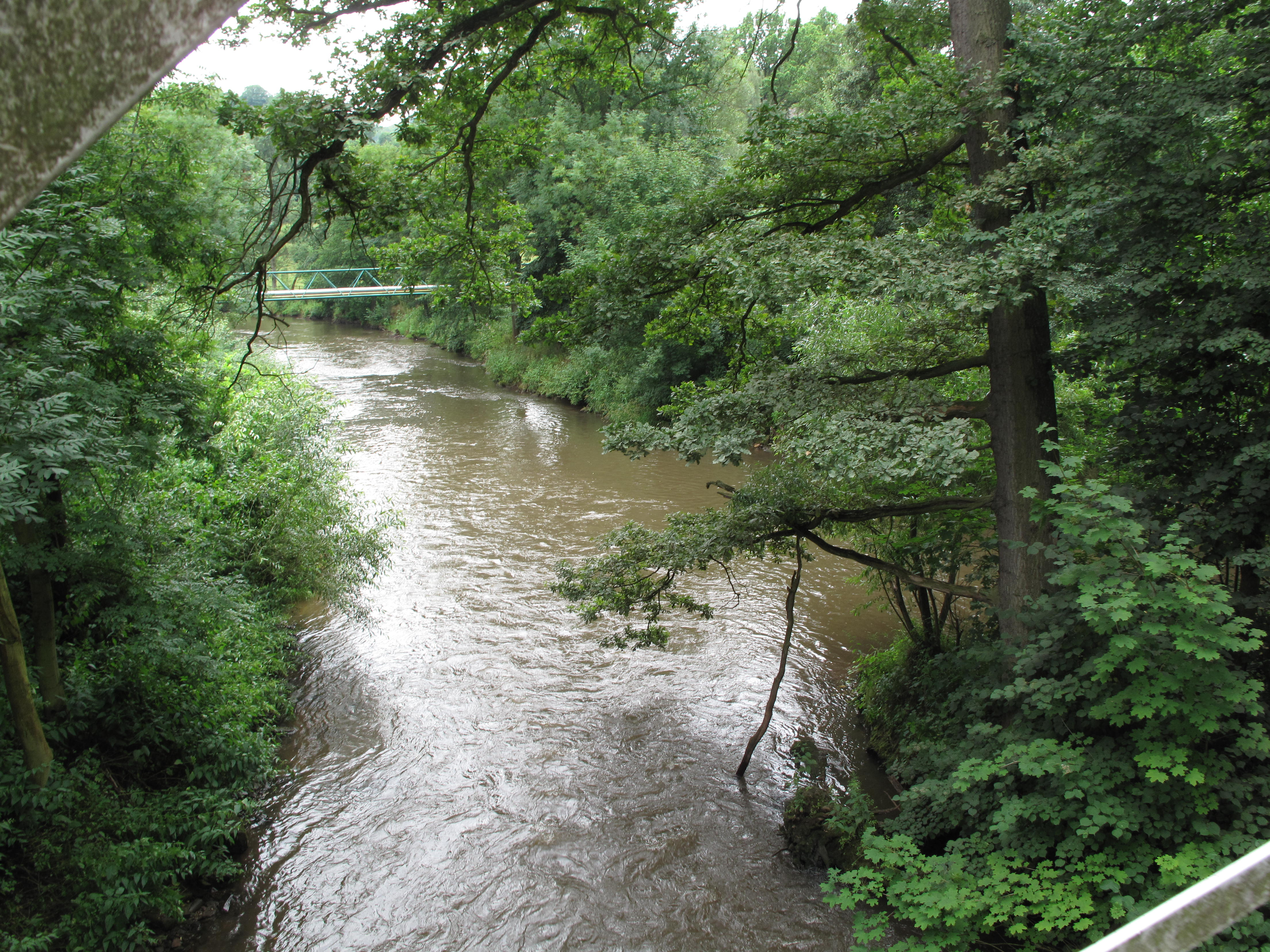 Stanovice, Labe